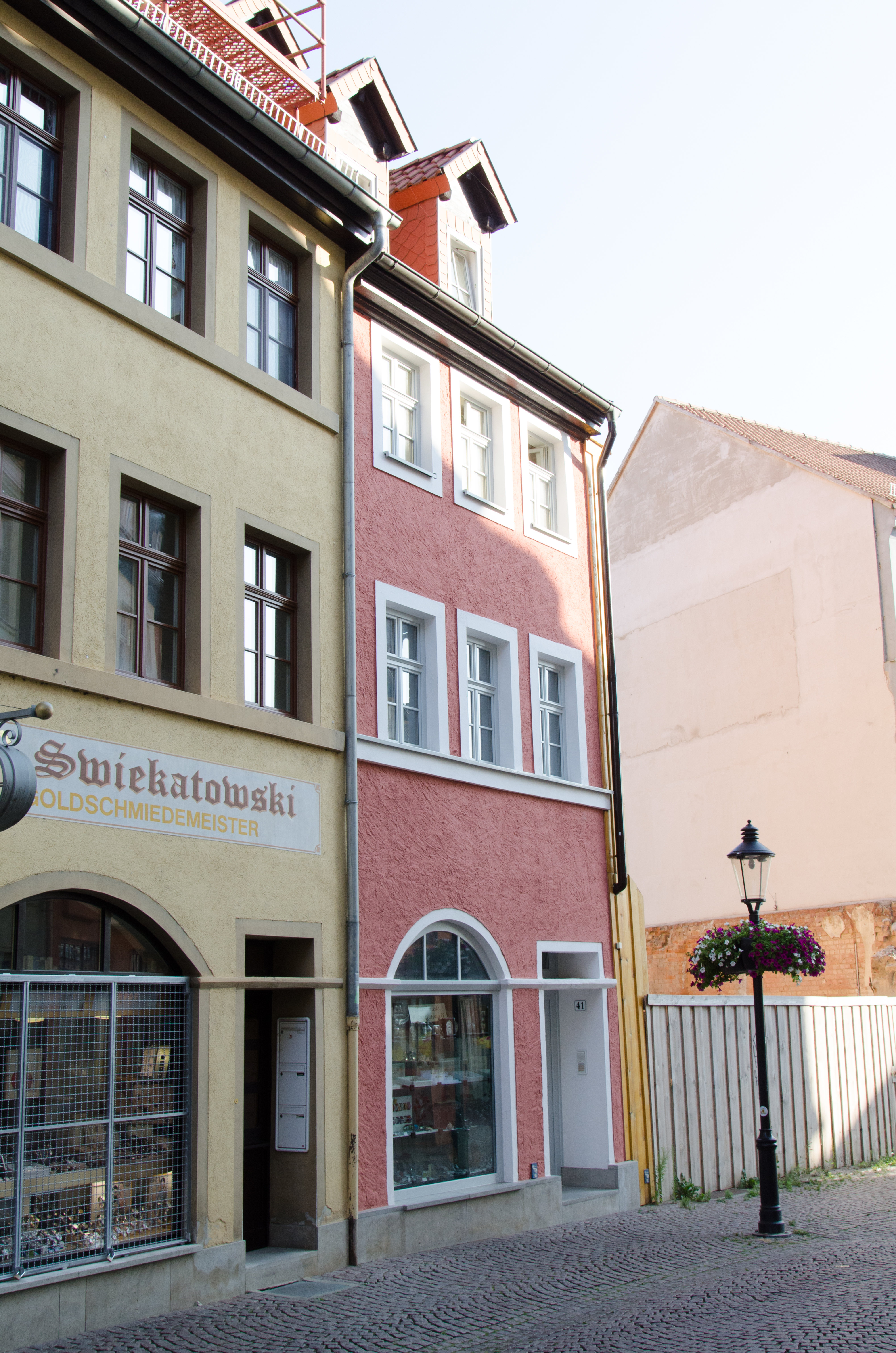 Naumburg, Salzstraße 41